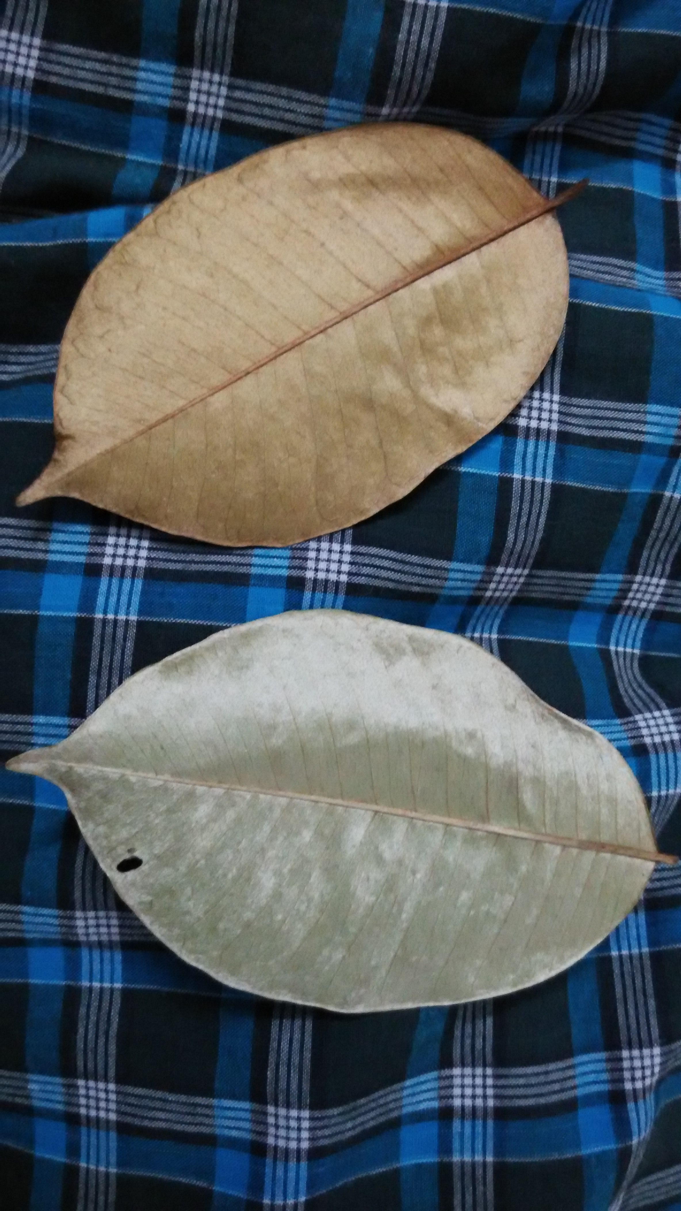 golden leaf of star apple